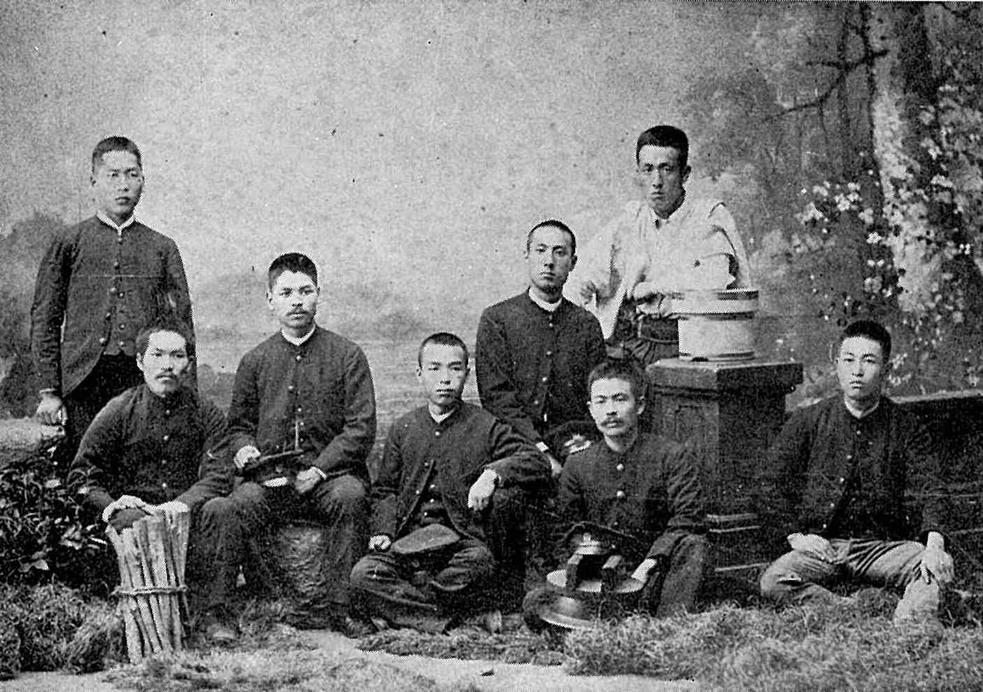 自炊堂同人 前列右から 針塚長太郎、中西水之丞、2人おいて楠厳 前列右から 望月滝三、菊池亀千代、鈴木梅太郎